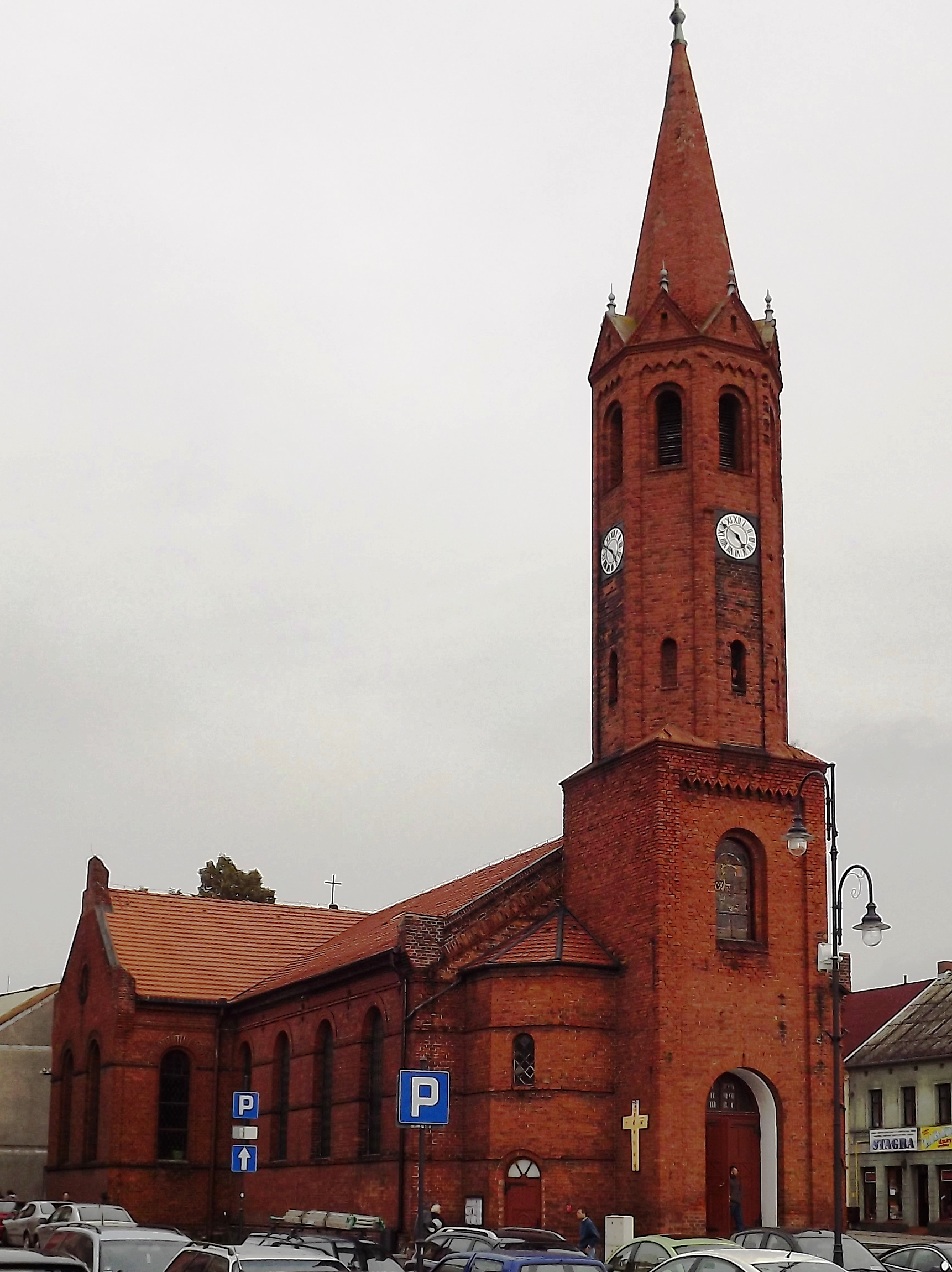 Wąbrzeźno, pl. Zwycięstwa - dawny kościół ewangelicki, obecnie rzymskokatolicki parafialny p.w. MB Królowej Polski, 1835, 1863 (zabytek nr A/648)